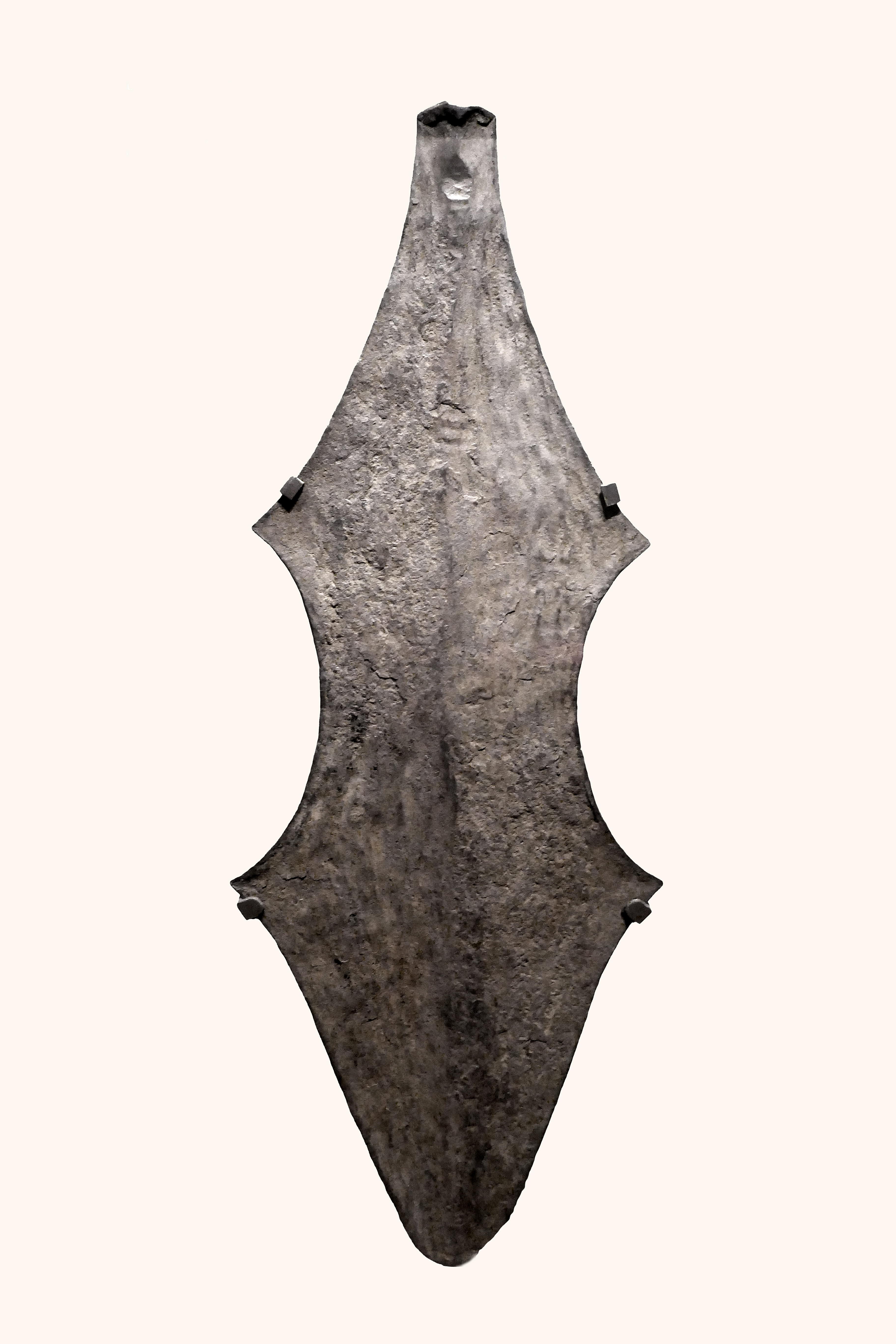 Monnaie en forme de lame de houe (chu'npo) Population Mfumte, Cameroun et Nigeria Artiste inconnu Fin du 19e siècle Fer Collection privée Objet présenté lors de l'exposition Frapper le fer. L'art des forgerons africains au musée du quai Branly Jacques Chirac.